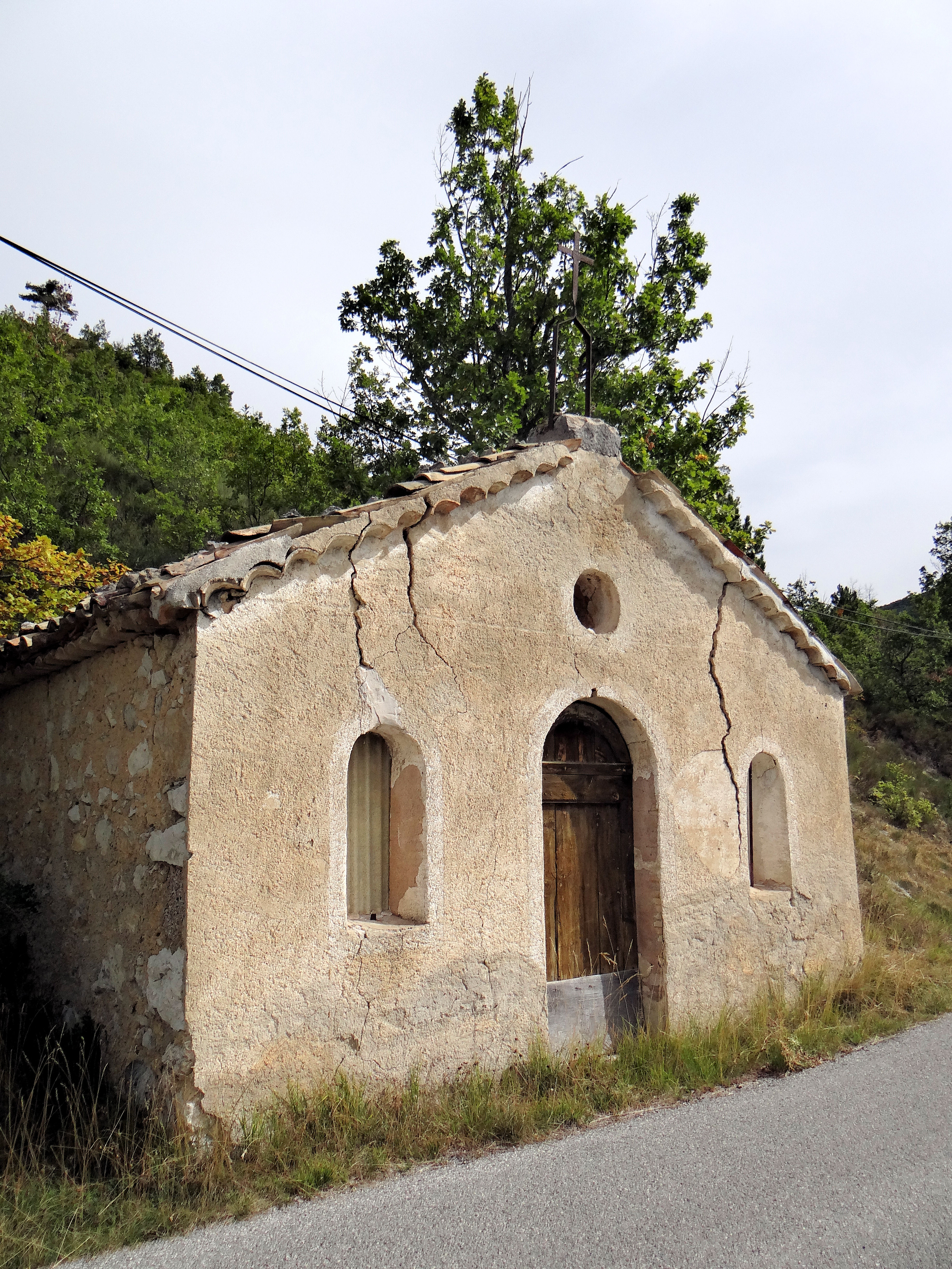 Castellane - Chapelle Saint-Antoine d'Éoulx